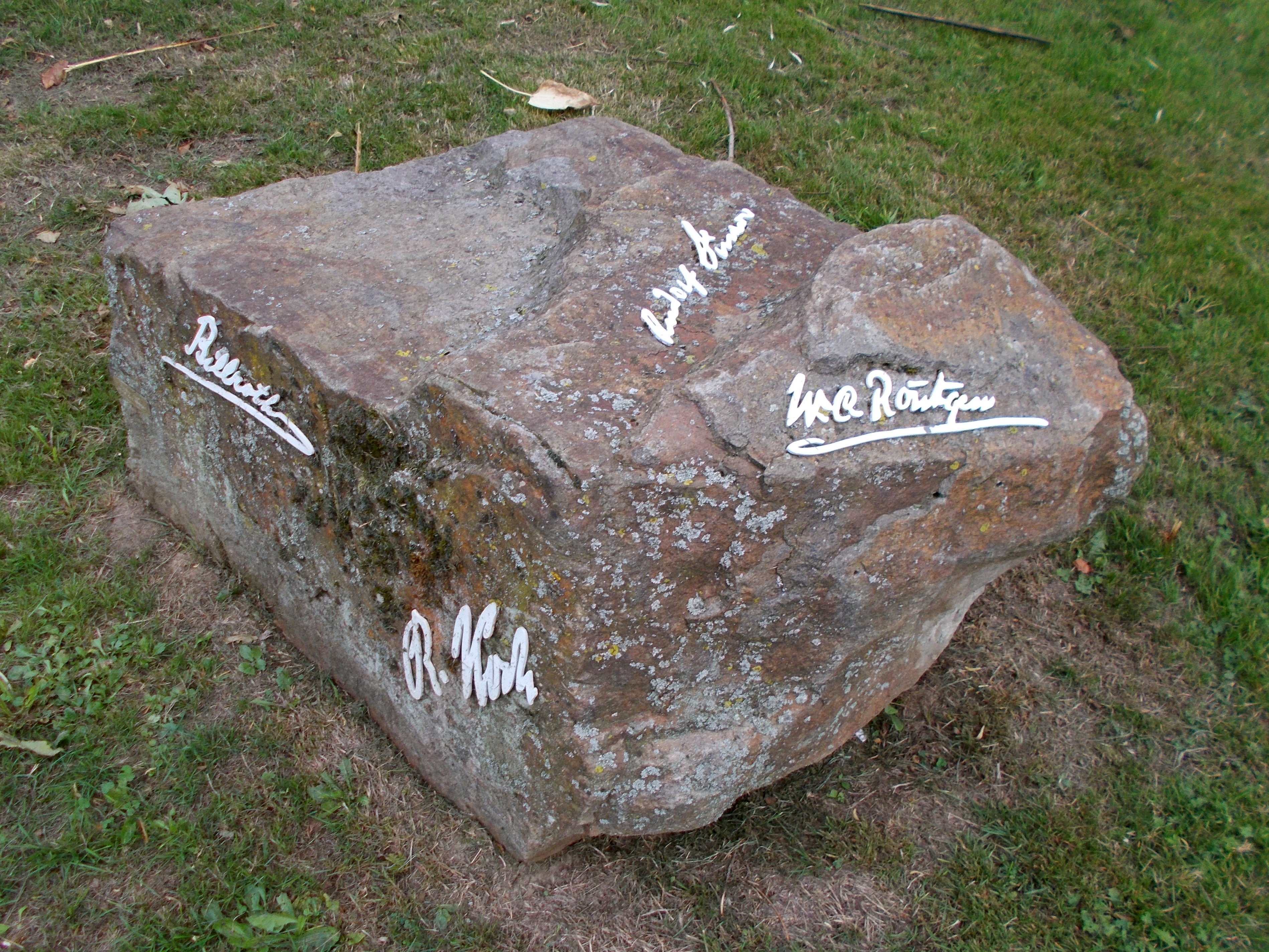 Zu Ehren Emil von Behring gestaltete 2013 die Mülheimer Künstlergruppe "AnDer" e. V. den Von-Behring-Platz. Skulptur "Stein der Weisen" von Helmut Koch.